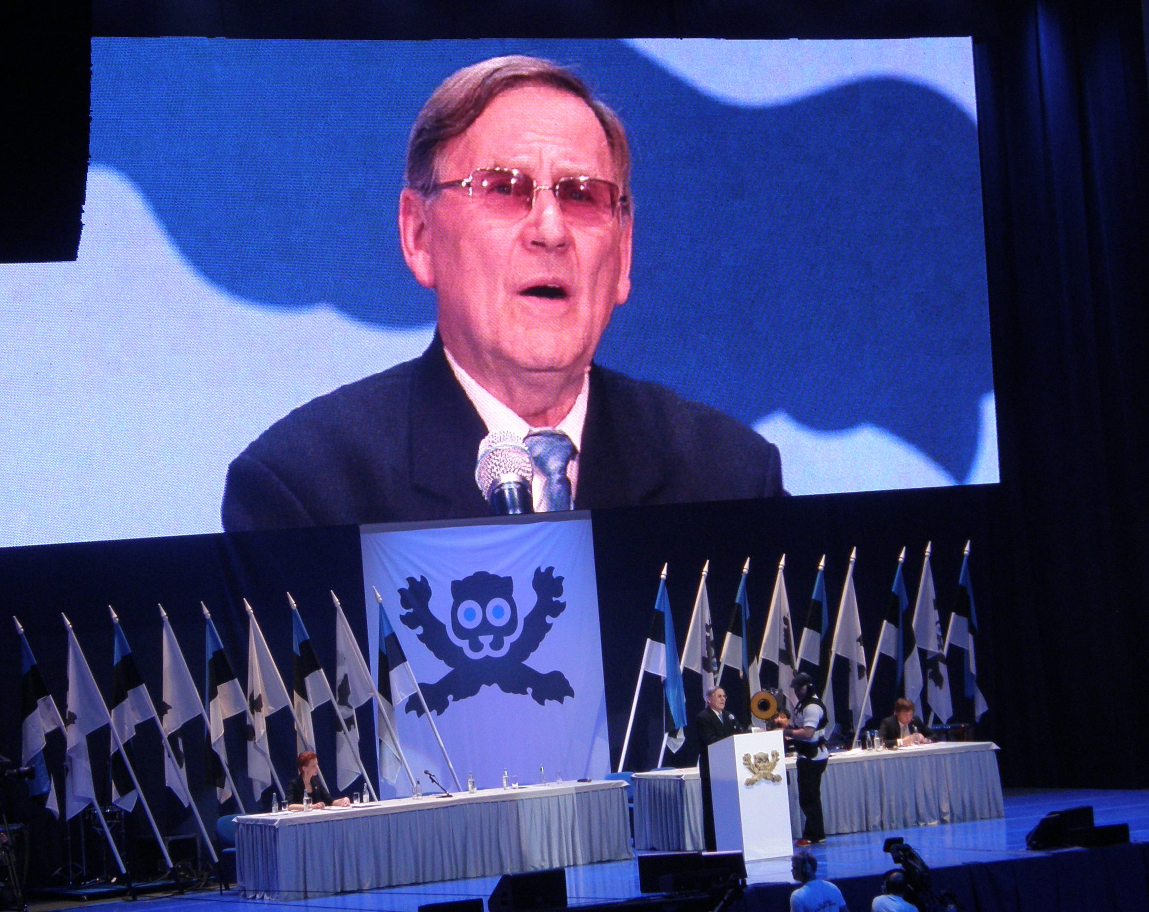 Rein Einasto esinemas "Ühtse Eesti" suurkogul Saku Suurhallis.